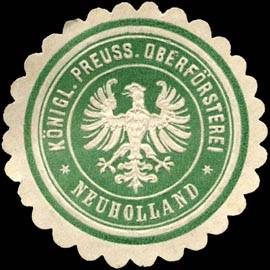 Sealing stamp Title: Königlich Preussische Oberförsterei - Neuholland Description: grün, weiß, geprägt Place: Neuholland size: 3 cm